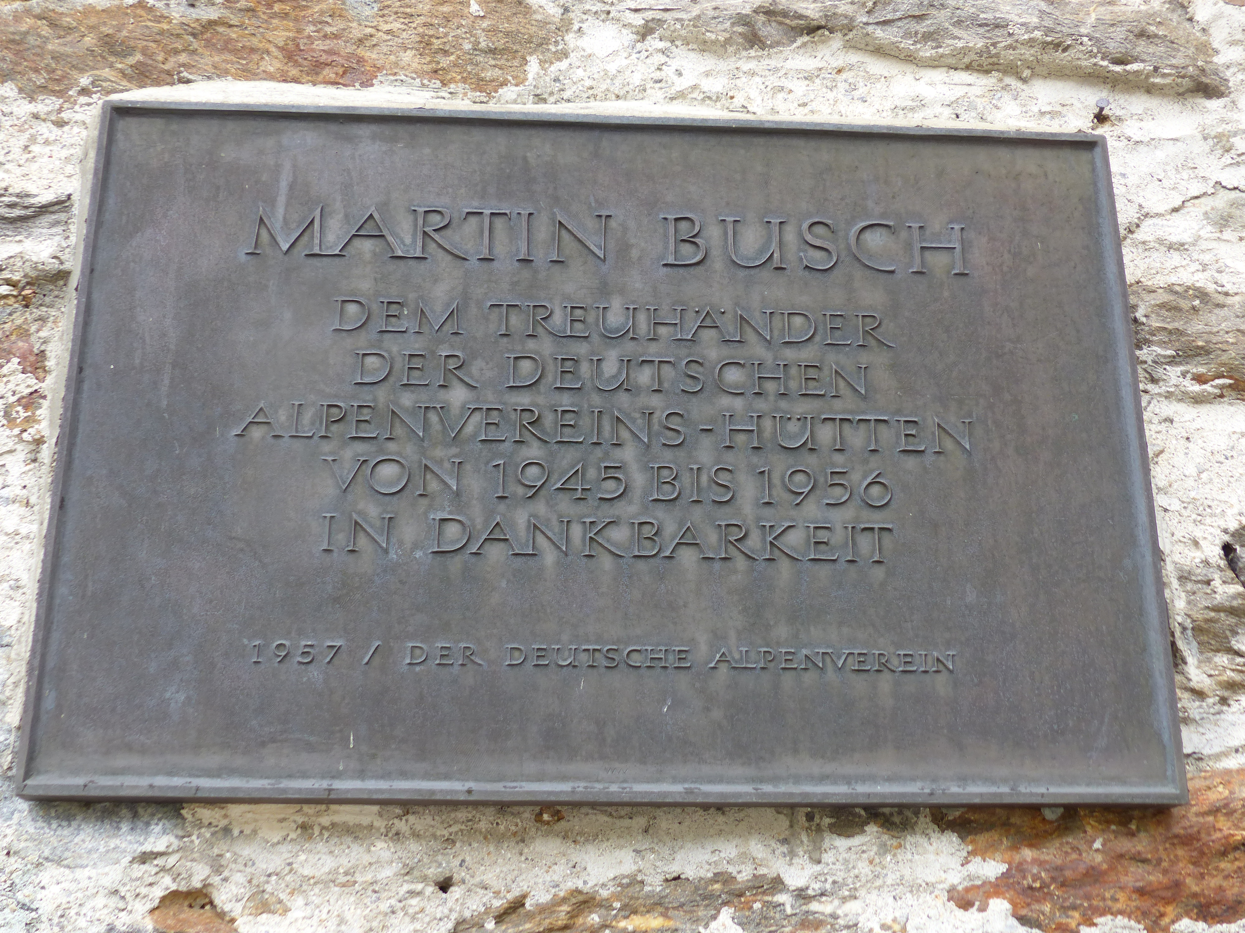 Gedenktafel für Martin Busch an der nach ihm benannten Alpenvereinshütte